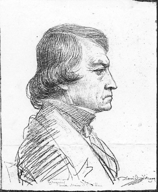 Louis-Furcy Grognier (1787-1833), portrait d'après nature par David d'Angers.